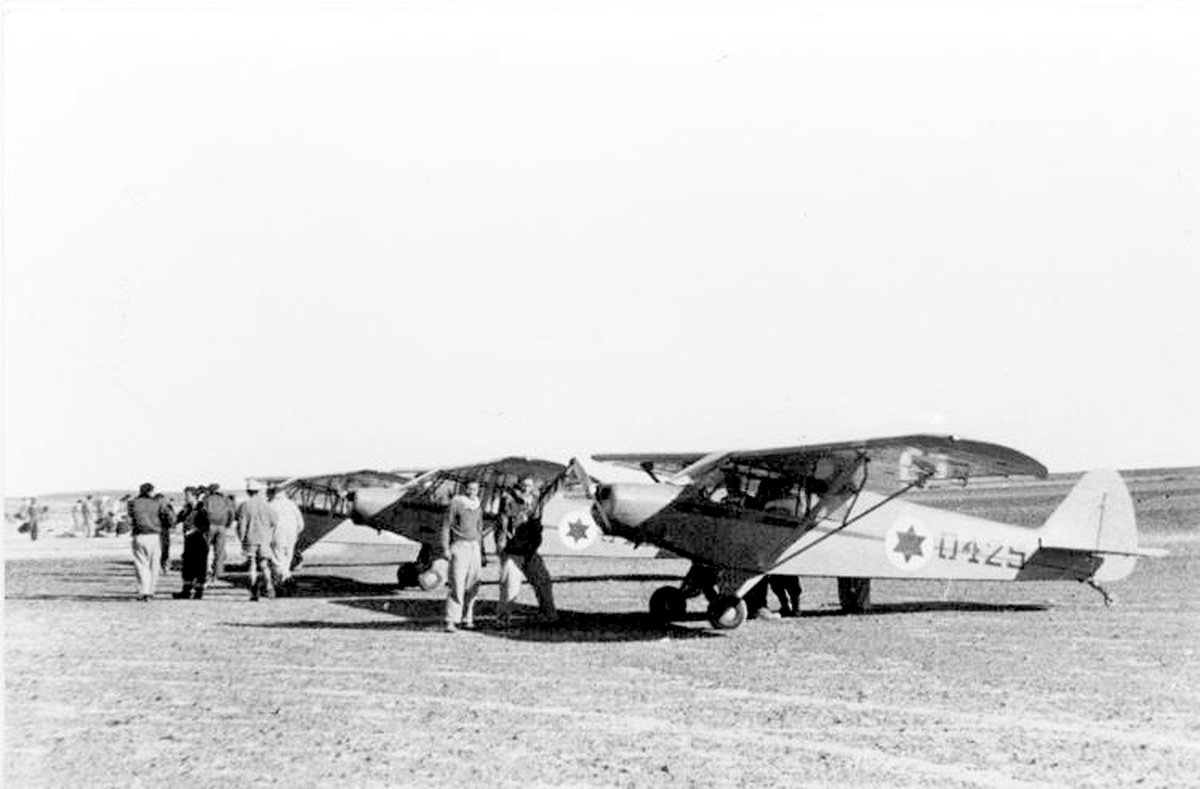 מטוסי פייפר בhe:שדה אברהם, בhe:מבצע עובדה